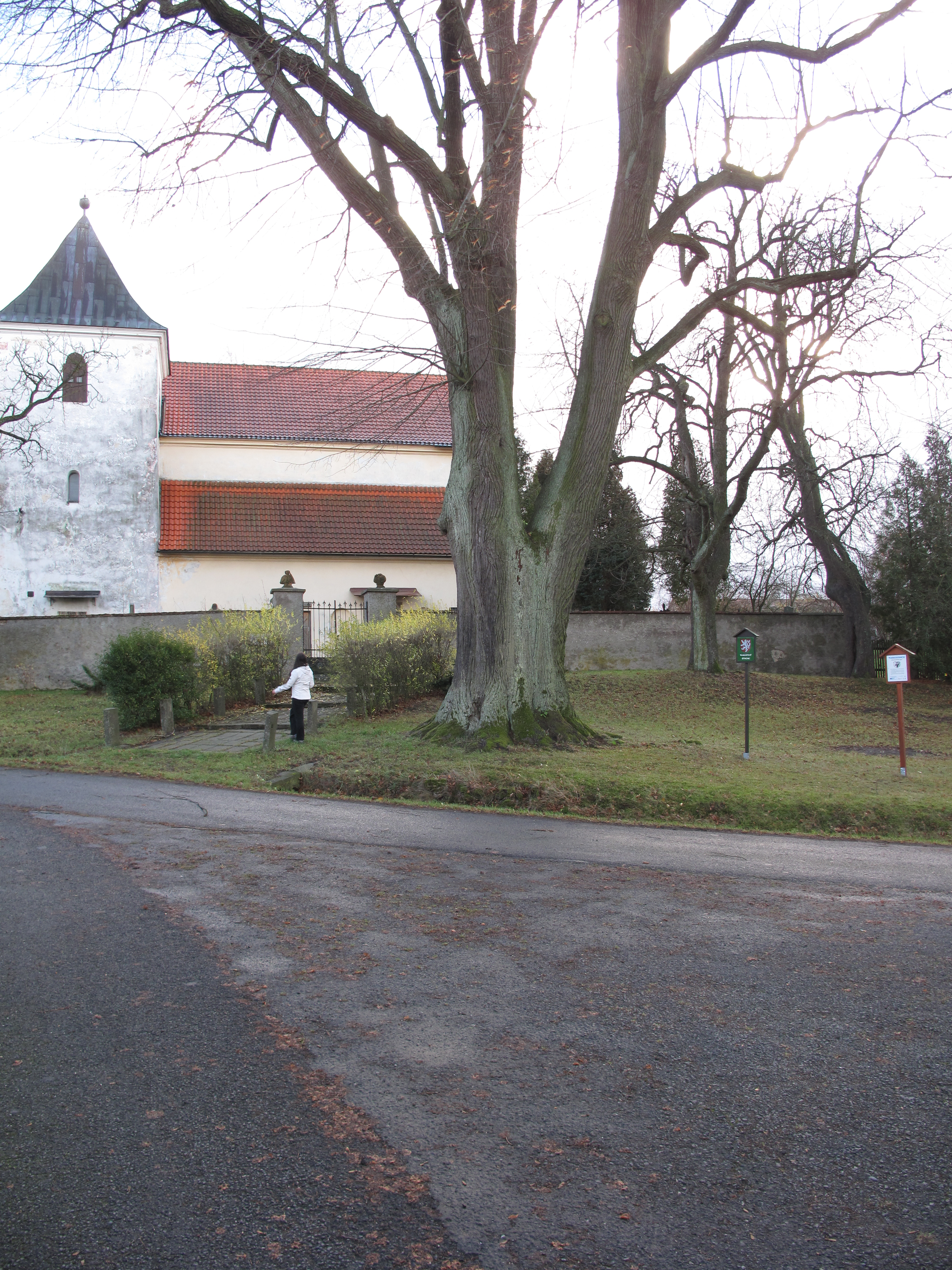 Kostel ve Střezimíři. Okres Benešov, Česká republika.